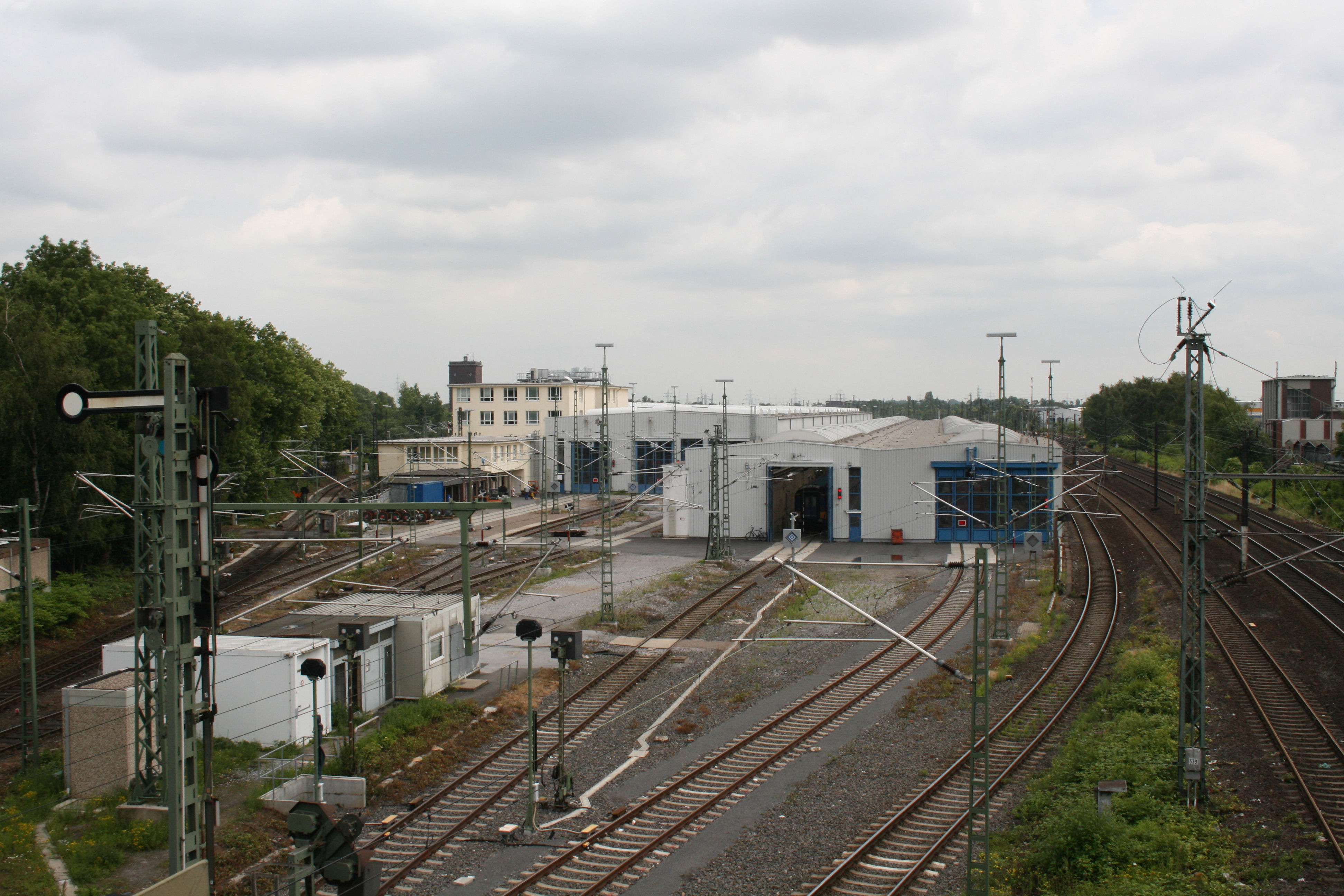 Betriebswerk Dortmund-Betriebsbahnhof, links die drei Tore ICE 3 Wartung und rechts die Tore RZW wartung